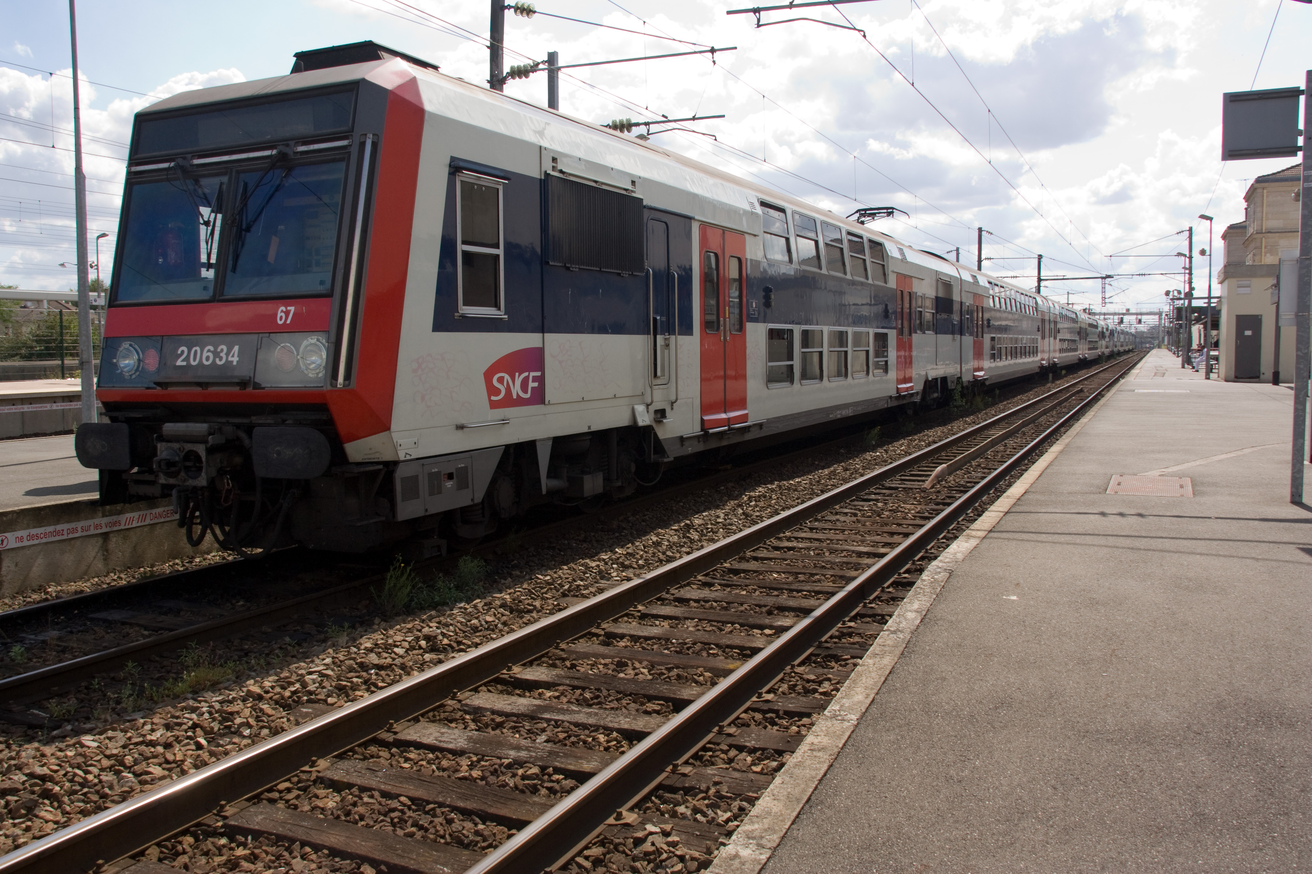 La Gare de Villiers-le-Bel - Gonesse - Arnouville, département du Val-d'Oise, France